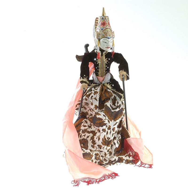 Stokpop. Deze wayang golekpop is een figuur uit de Menak-cyclus (Amir Hamza verhalen). Hij is de vorst van Pusir Bumi. Jayengrana is zijn naam als hij vorst wordt. Daarvoor is hij bekend als Amir Hamza of Ambyah of Menak. Hij is de zoon van Abdul Muntalip (Mutalib) de stadhouder van Yemen. Amir Hamza is in Mekka geboren en groeit op met zijn vriend Umarmaya. Zijn gezicht is een weerspiegeling van zijn verfijnde en beheerste karakter. Zijn blik in naar de aarde gericht en als het ware in zichzelf gekeerd. Zijn witte gelaat staat voor zijn zuiverheid. Sommige Westerse mensen hebben de neiging om een dergelijk gezicht te interpreteren als een geniepig en sluw karakter. Hieruit blijkt dat de interpretatie van persoonlijke kenmerken middels het gelaat cultuur gebonden is. Het uitbeelden van de wajangpoppen is in dit geval gestileerd-realistisch. Voor de meeste moslims op Java is dat geen enkel probleem. Sommige streng orthodoxe moslims zullen dit afwijzen omdat het in de Koran zou staan dat het afbeelden van mensen verboden is. Dat is een omstreden interpretatie, want anderen zeggen dat er in de Koran staat dat het verboden is om afbeeldingen van mensen te aanbidden. Niet dat het afbeelden op zich verboden zou zijn.. Houten wajangpop Amir Hamza alias Menak alias Jayengrana voorstellend Unknown language: Jayengrana Wayang golek tengul